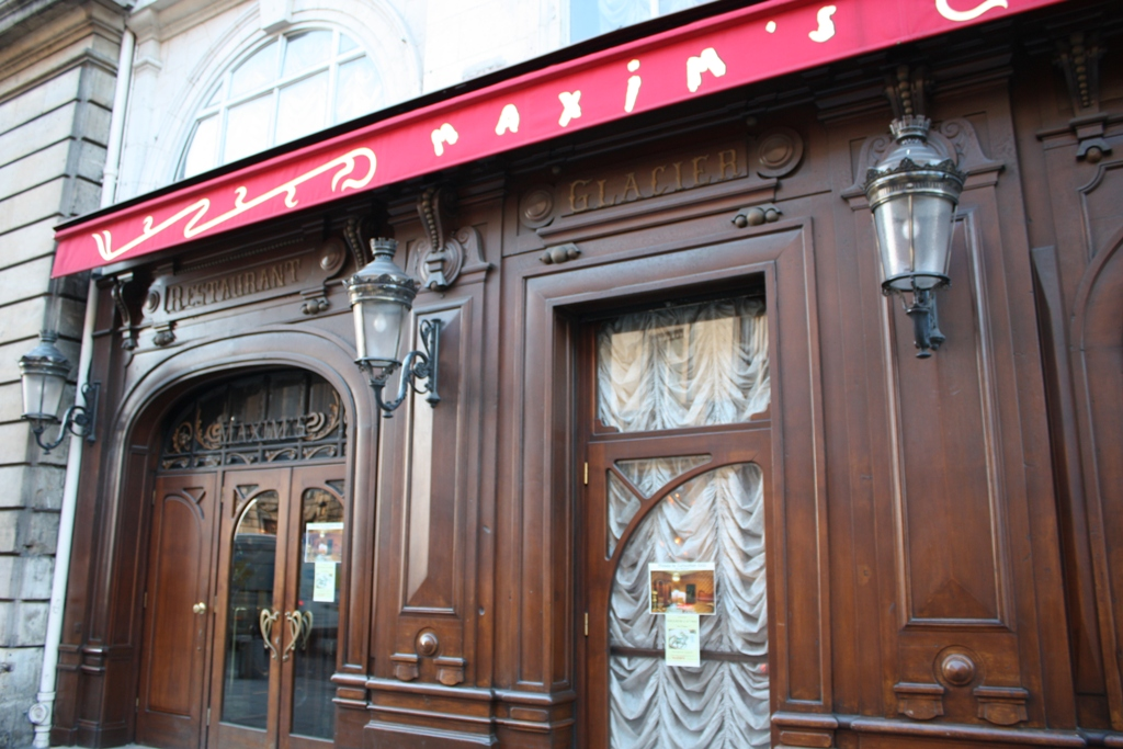 Maxim's